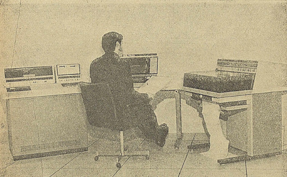 ICL 7503, stacja transmisji danych